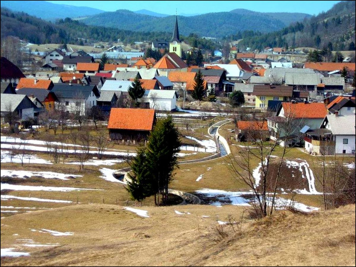 PREZID, Čabar